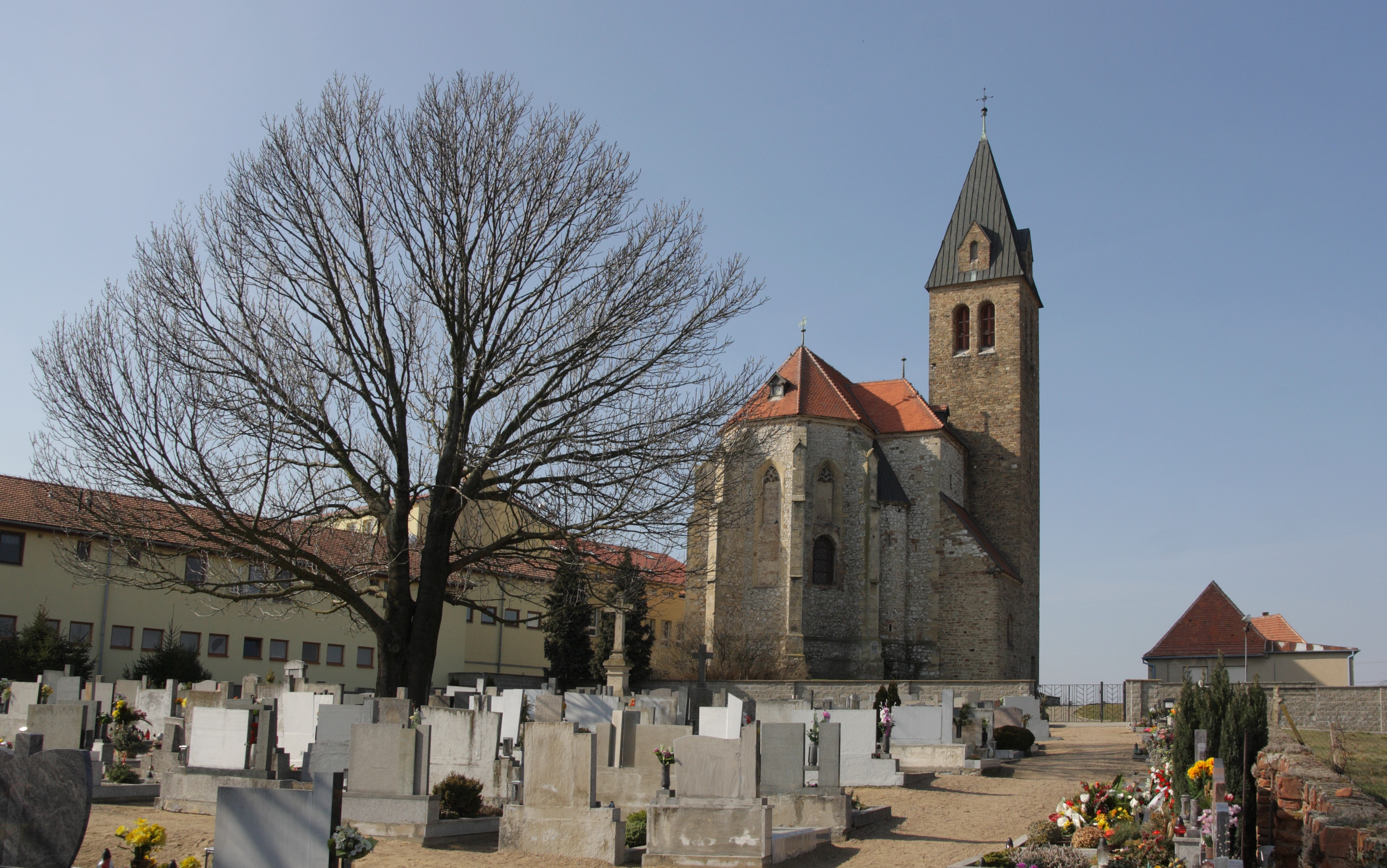 Zaječí - kostel sv Jana Křtitele.